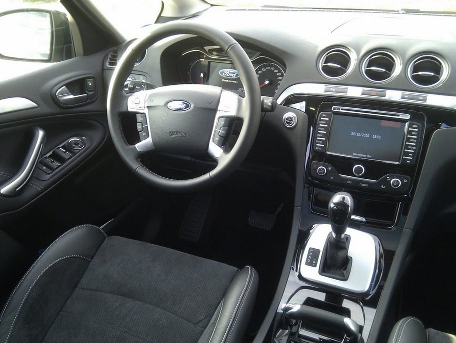 S-MAX Innenraum